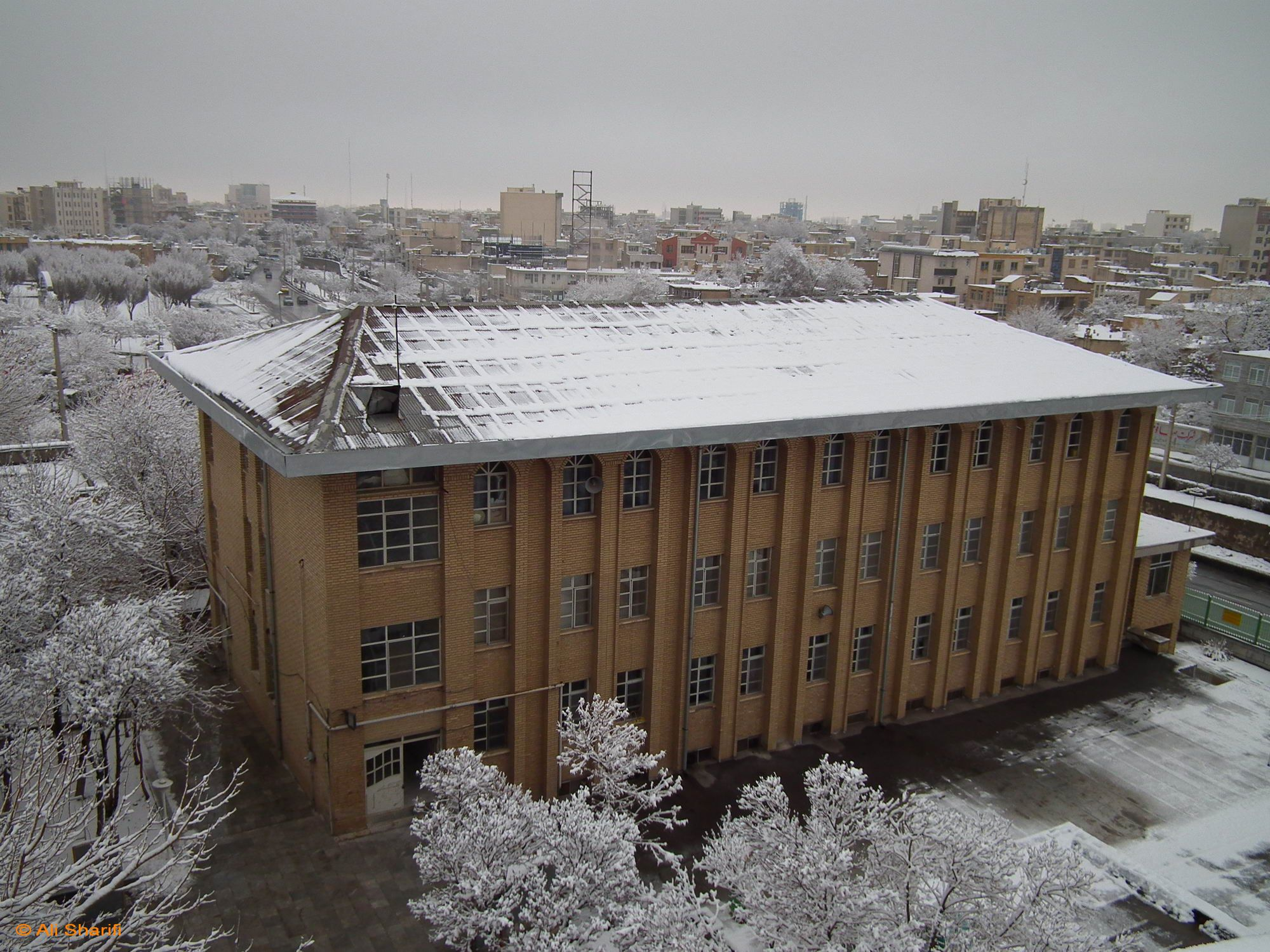 ساختمان نمازخانه و سالن غذاخوری دانشگاه اراک